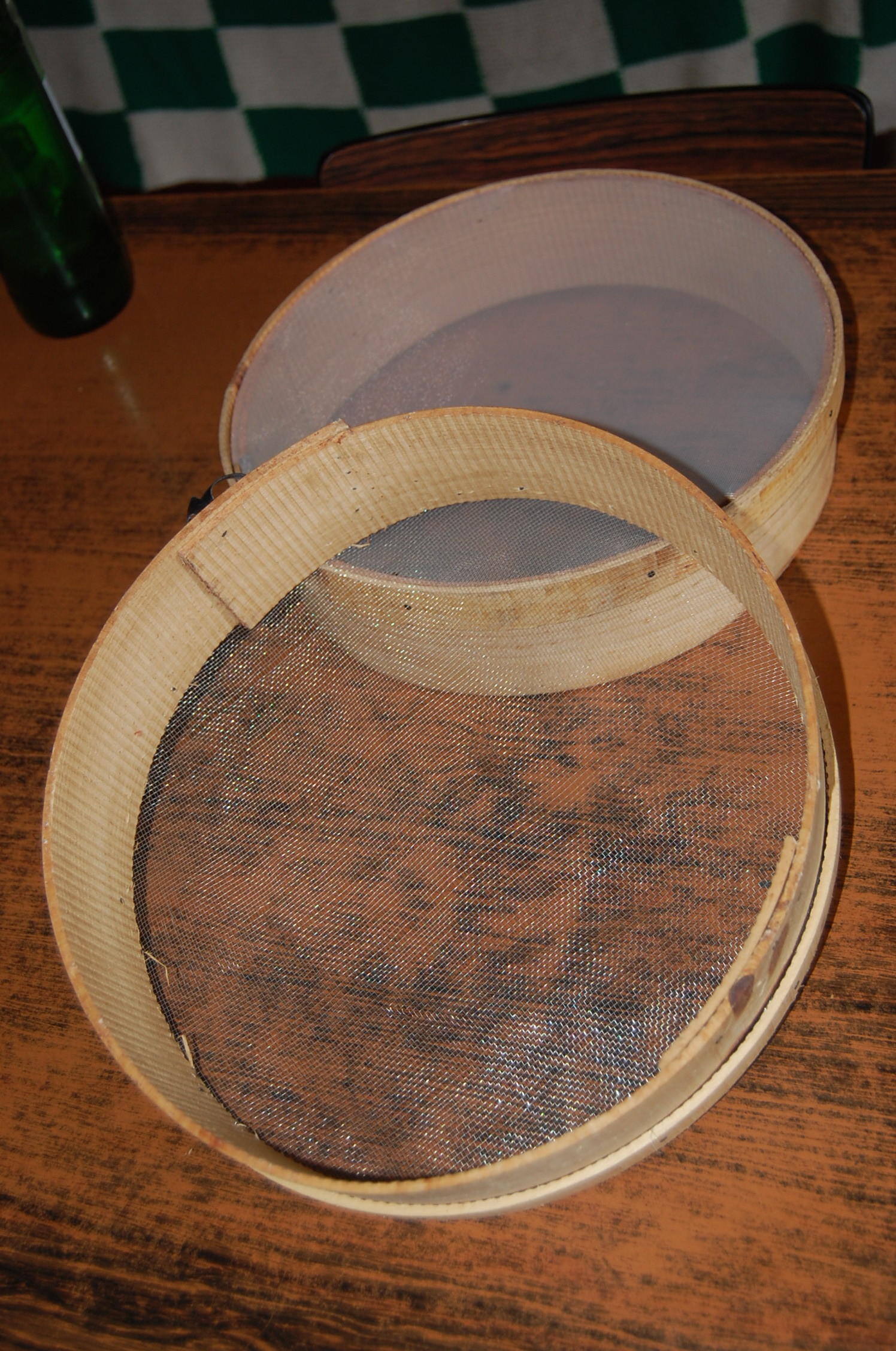 Walon: deus ptits raidjes